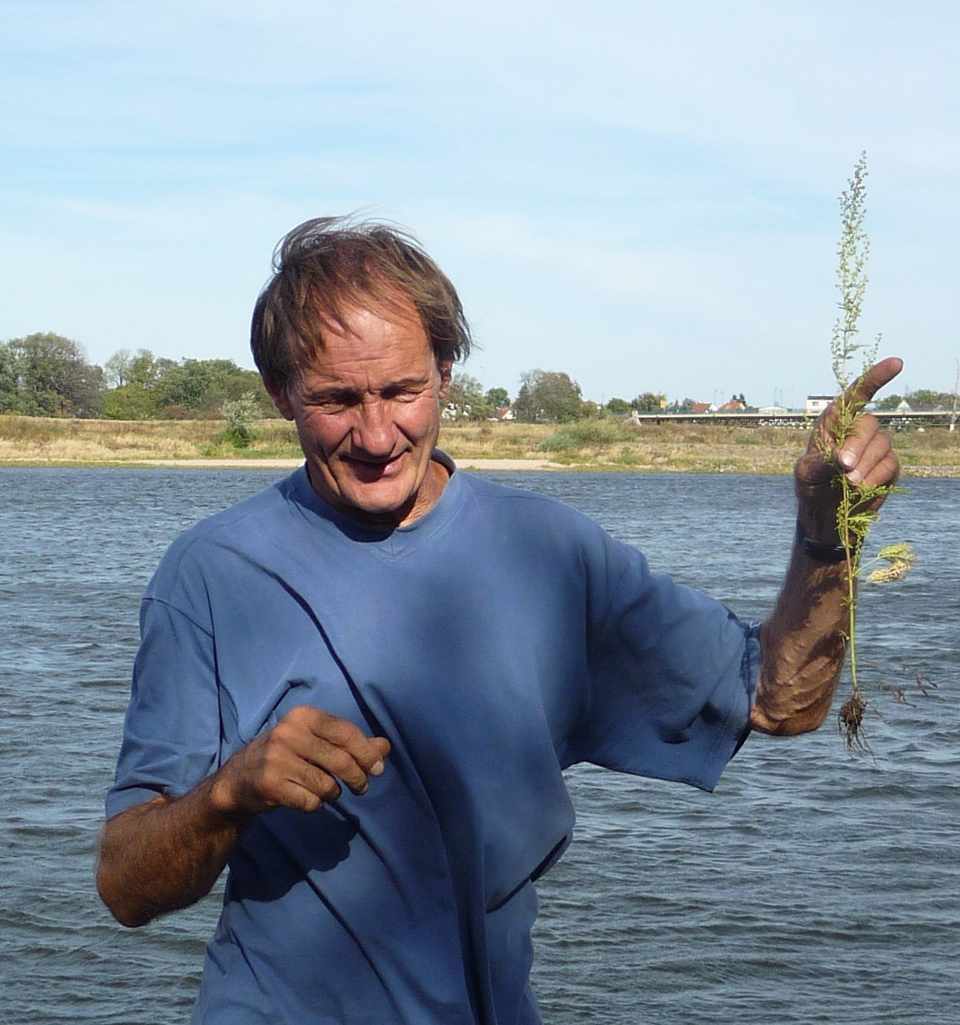 Extrembotaniker Jürgen Feder